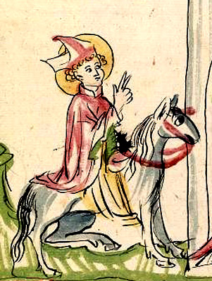 St. Arbogast by Srtasburg ru: святой Арбогаст въезжает в Страсбург